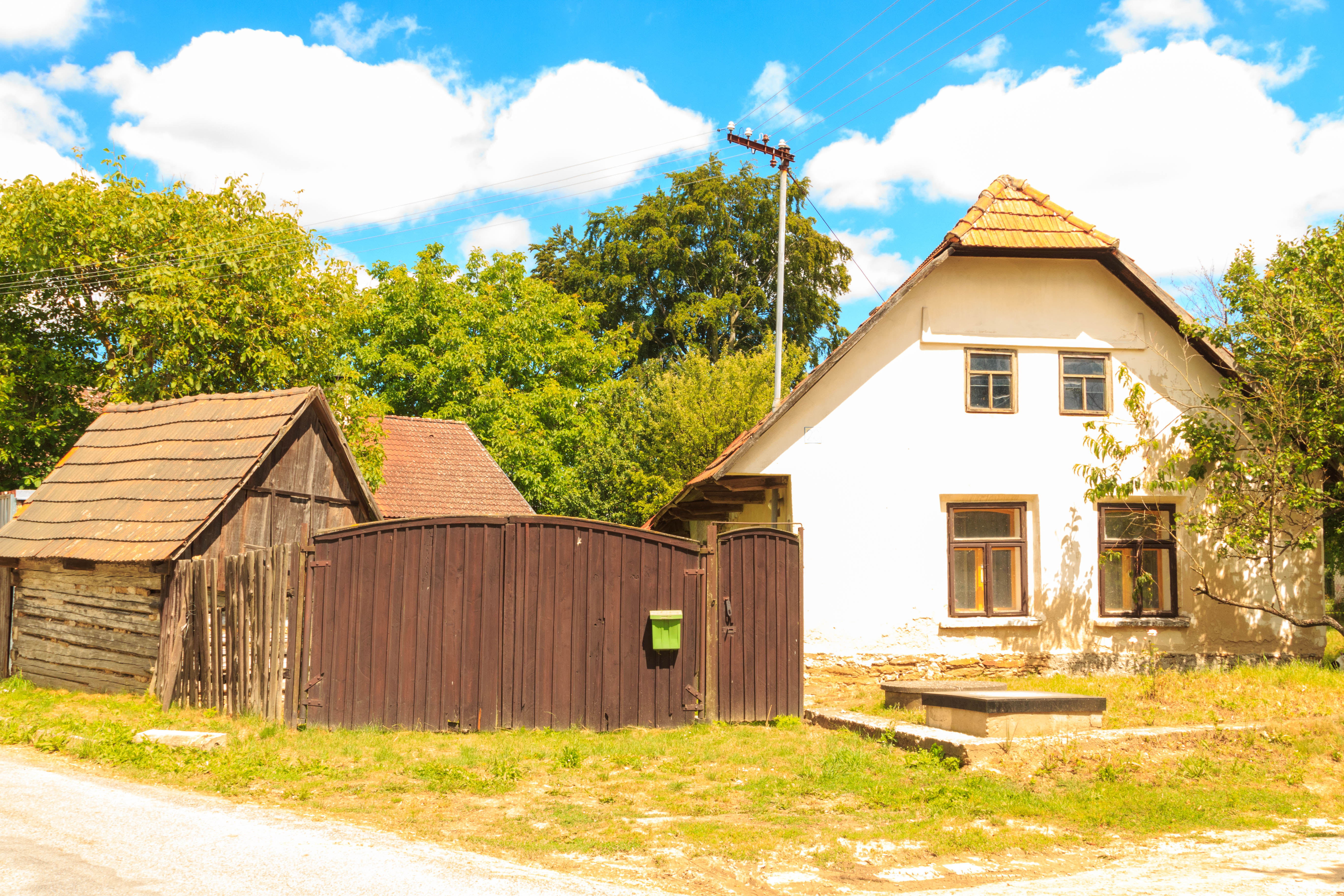 Tunochody čp. 37